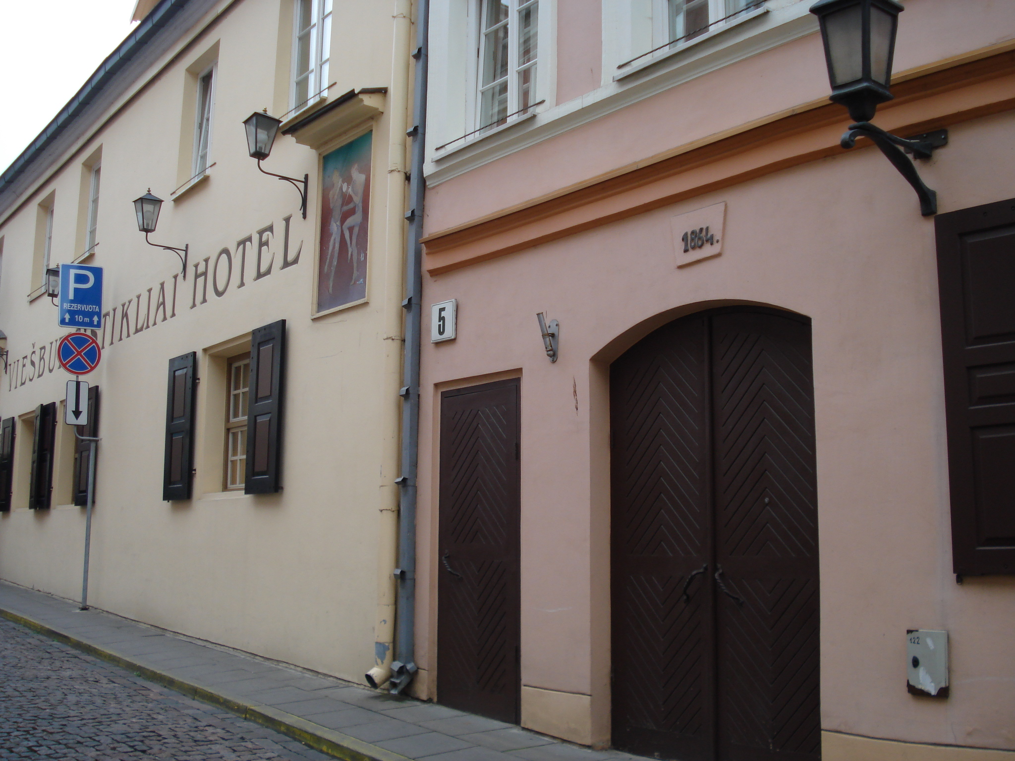 Gaono gatvė (Gaono street) in Vilnius, 5 and 7. Guesthouse Stikliai